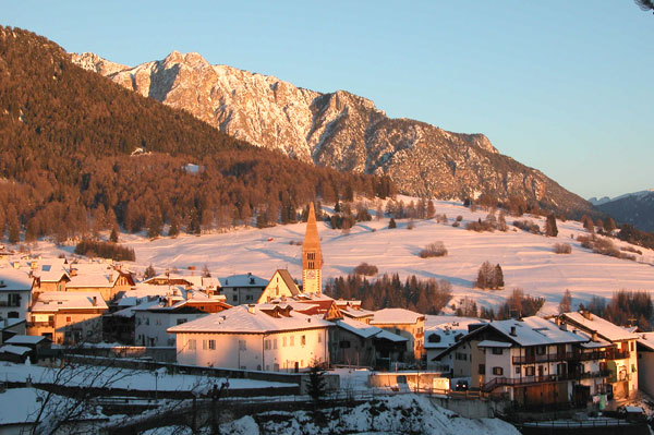 Varena